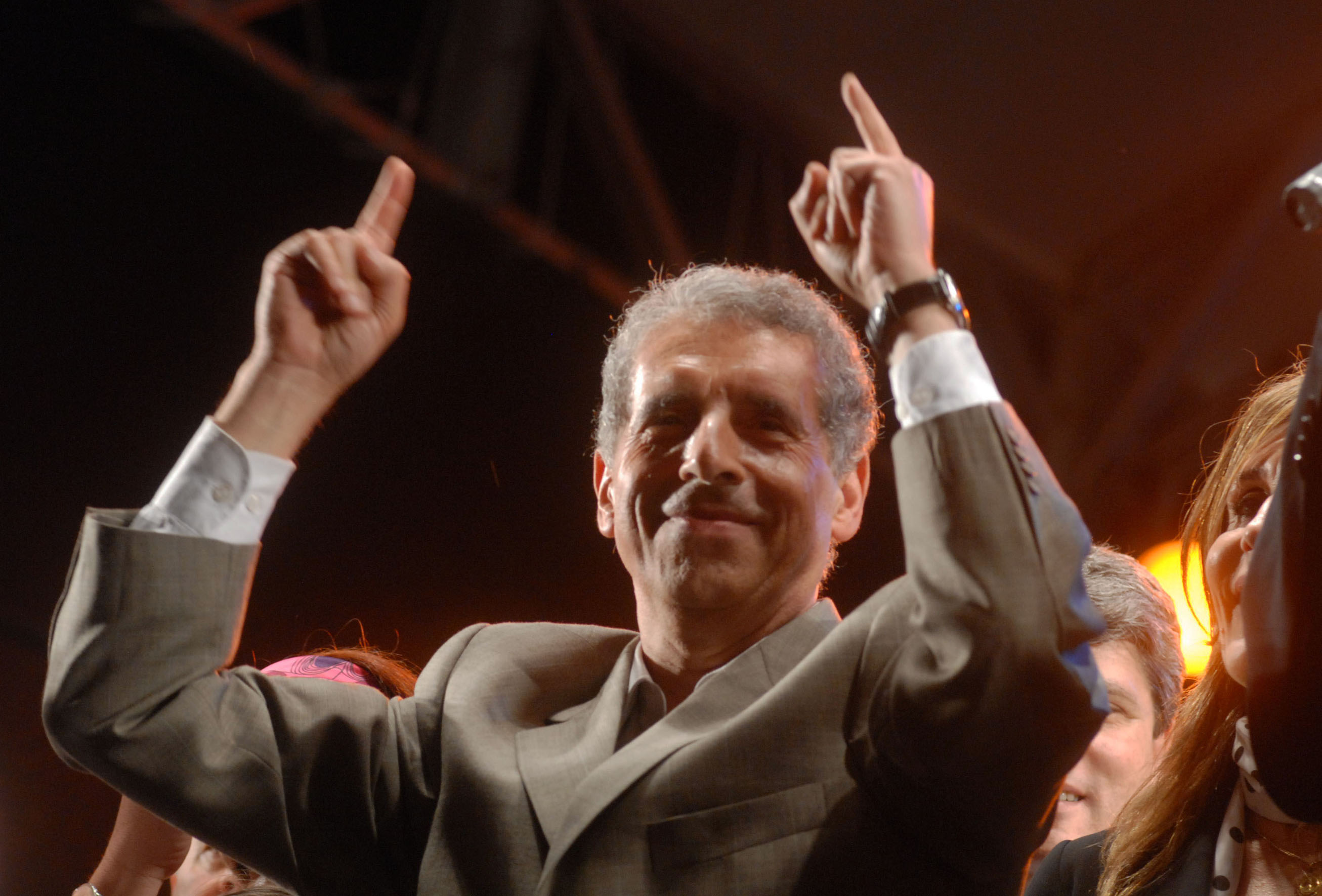 O político brasileiro José Fogaça em um comício de campanha a prefeitura de Porto Alegre